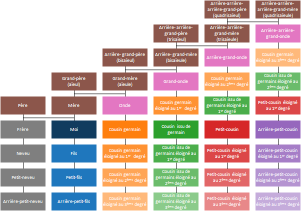 C'est un arbre généalogique qui illustre les différents termes décrivant les relations de famille (cousin issus de germains, petit-cousin éloigné au 2e degré, etc.)